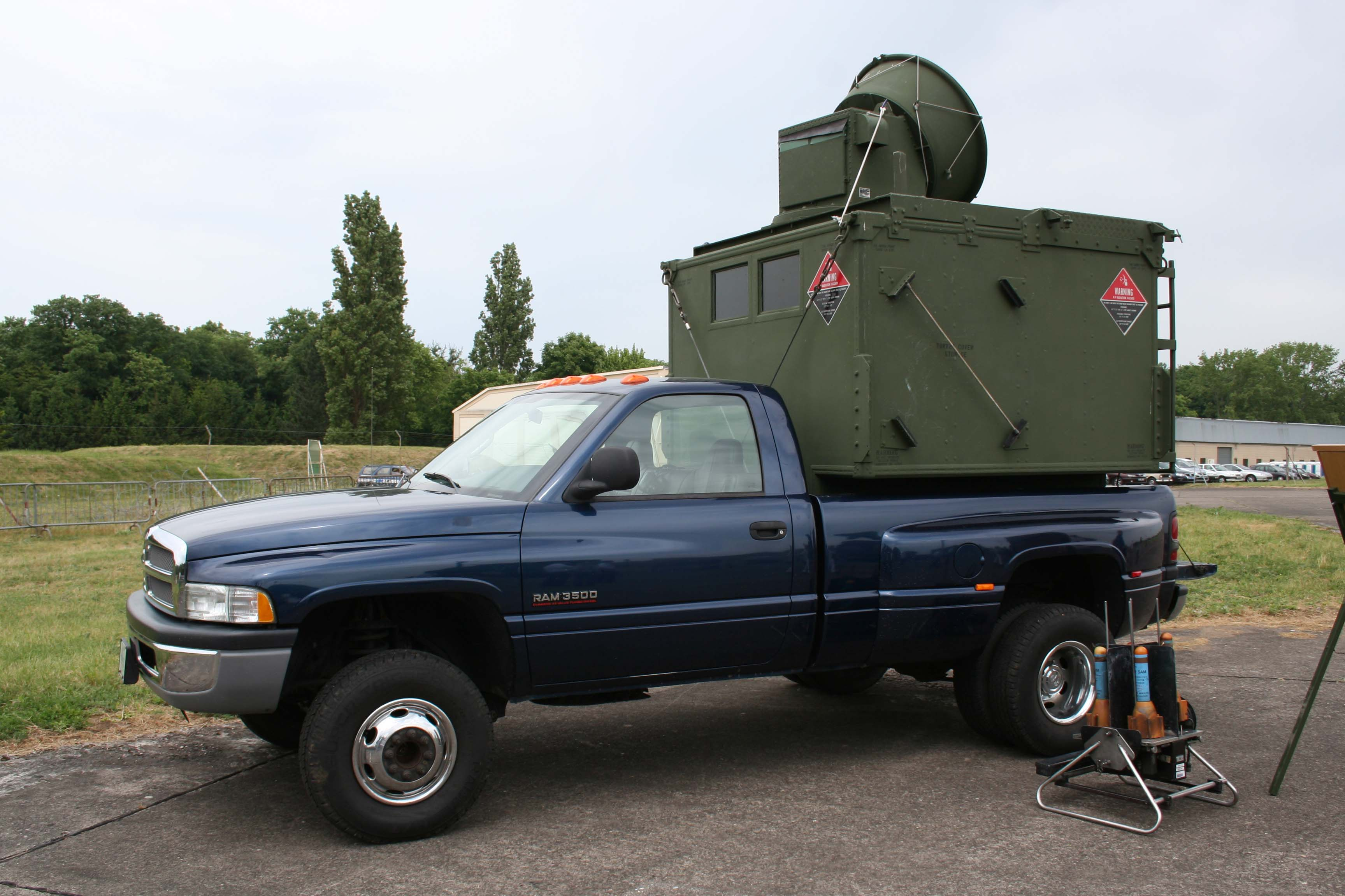 Simulateur de menace AN/VPQ-1 du Polygone de Guerre Electronique sur la BA128 de Metz-Frescaty en 2007